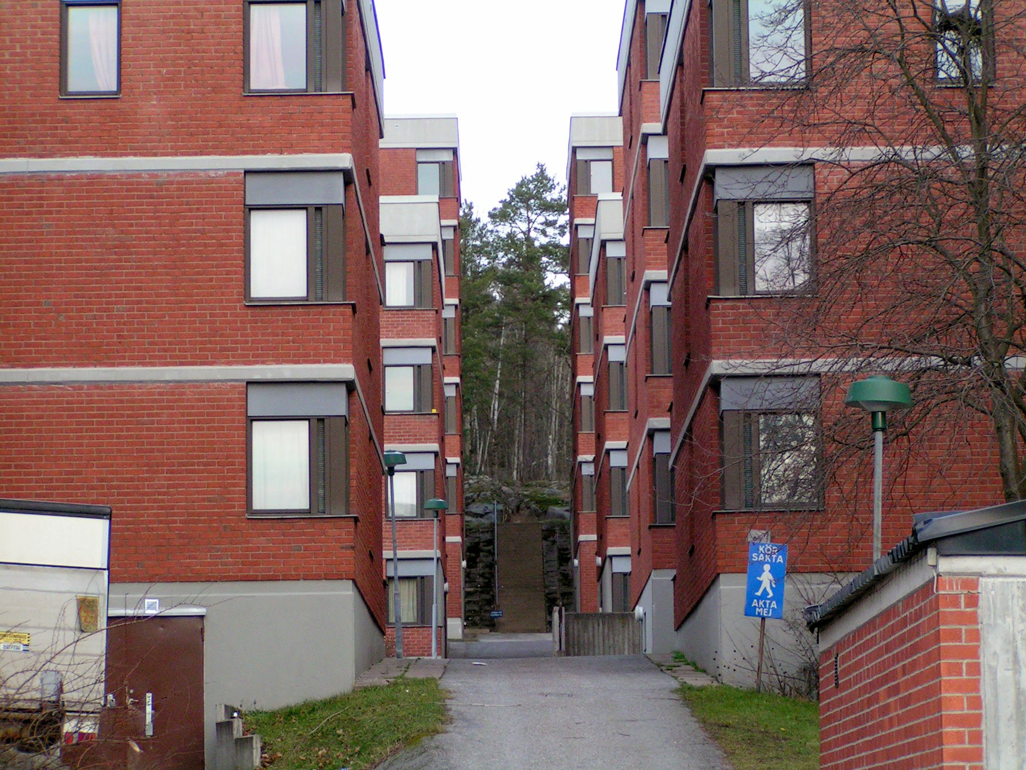 Lappkärrsberget, student housing complex, Stockholm